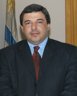 Mario Bergara, Ministro de Economía de Uruguay